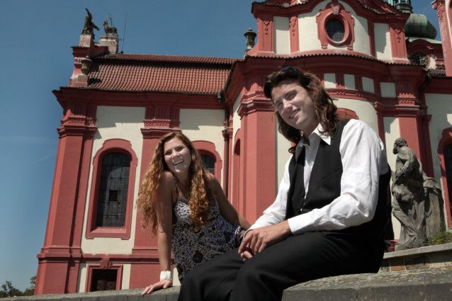 aneb zlonické požehnání zpupným teletem (Tento díl získal cenu poroty na EFF v Telči)